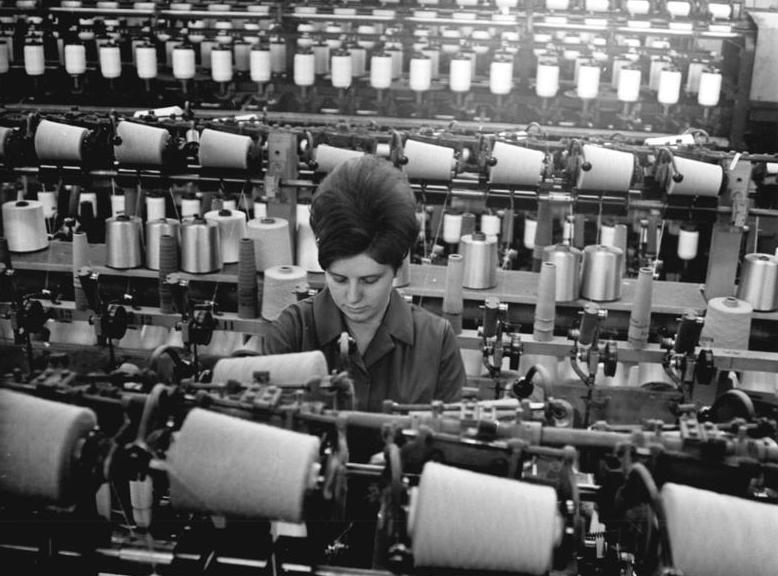 Zentralbild-Häßler 30.03.1970 Bez. Dresden: Kampf um Planerfüllung im Sächsischen Kunstseidenwerk Pirna. 122 Brigaden kämpfen im VEB Kunstseidenwerk "Siegfried Rädel" in Pirna im Rahmen des Leninwettbewerbes um den Titel "Kollektiv der sozialistischen Arbeit". Auch die drei Brigaden des Jugendobjektes -Texturierung - gehören dazu. Textilfaserfacharbeiterin Ursula Sutter arbeitet auf unserem Foto an einer Texturiermaschine. Zusätzlich zu ihrem Kampfprogramm haben sich die Jugendlichen das Ziel gesteckt, durch die Witterungseinflüsse eingetretene Planrückstände schnell aufzuholen."